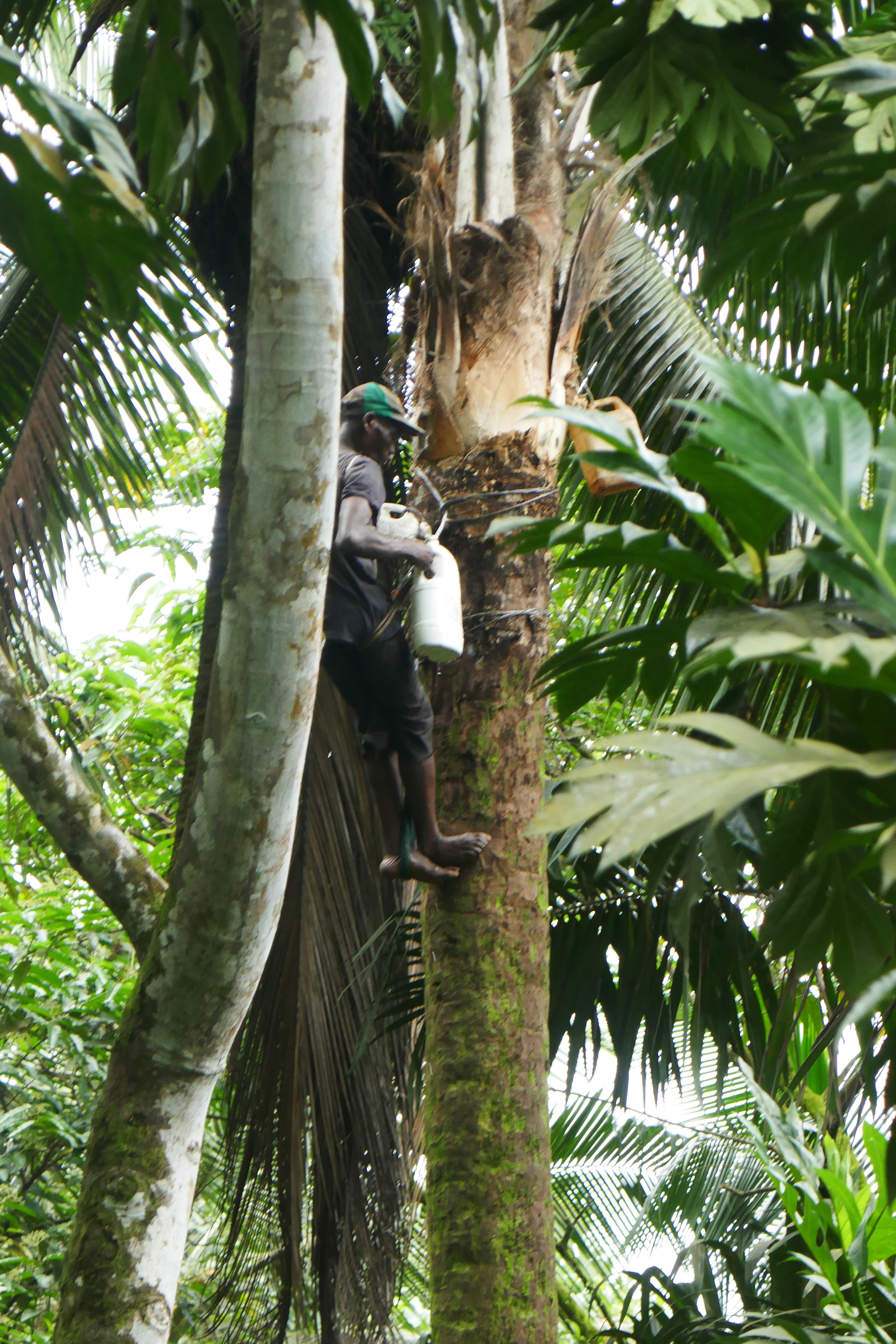 Récolteur de vin de palme à Ribeira Peixe, au sud-est de l'île de São Tomé, dans le district de Caué (São Tomé-et-Principe).